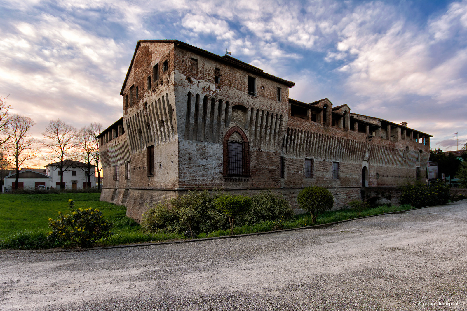 Costruita per volere di Pier Maria Rossi tra il 1446 e il 1463, venne dedicata all'amante Bianca Pellegrini. La struttura di forma quadrangolare viene anticipata da alcuni resti di mura della prima cinta muraria originaria e da un ponte levatoio. Nel cortile, nella parte opposta all'ingresso, è presente un mastio, costruito su due livelli. All'interno dell'edificio si trovano affreschi come la Storie di Griselda (centesima storia del Decamerone del Boccaccio) di Niccolò da Varallo e il Ciclo astrologico. (wikipedia)